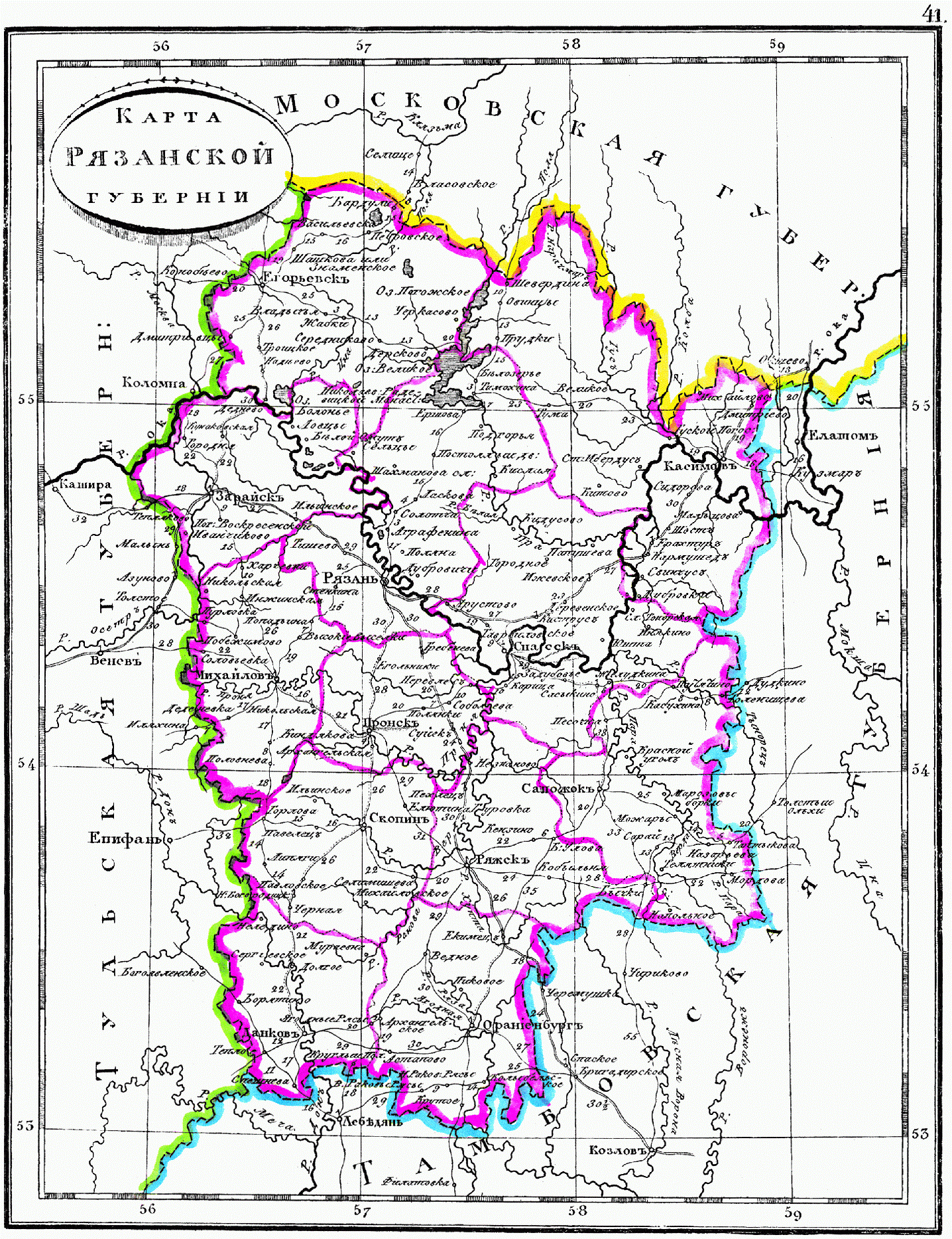 Карта Рязанской губернии, 1835